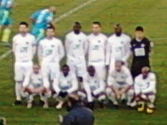 L'équipe de l'Entente Sannois Saint-Gratien avant le match du 7ème tour de Coupe de France contre le RC Lens du 19 novembre 2011 (2-1 a.p.)